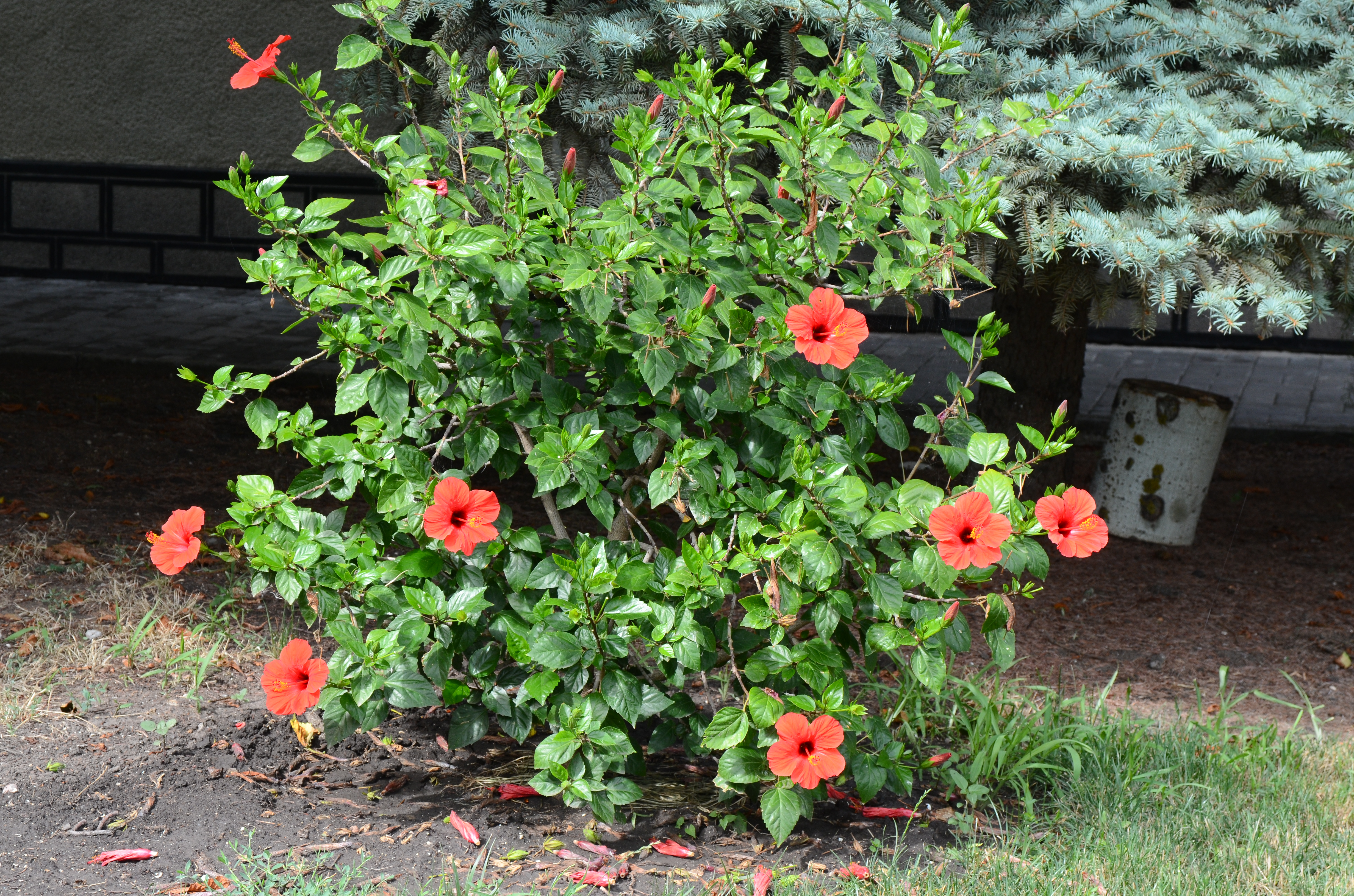 Седово. Пансионат «Металлург»